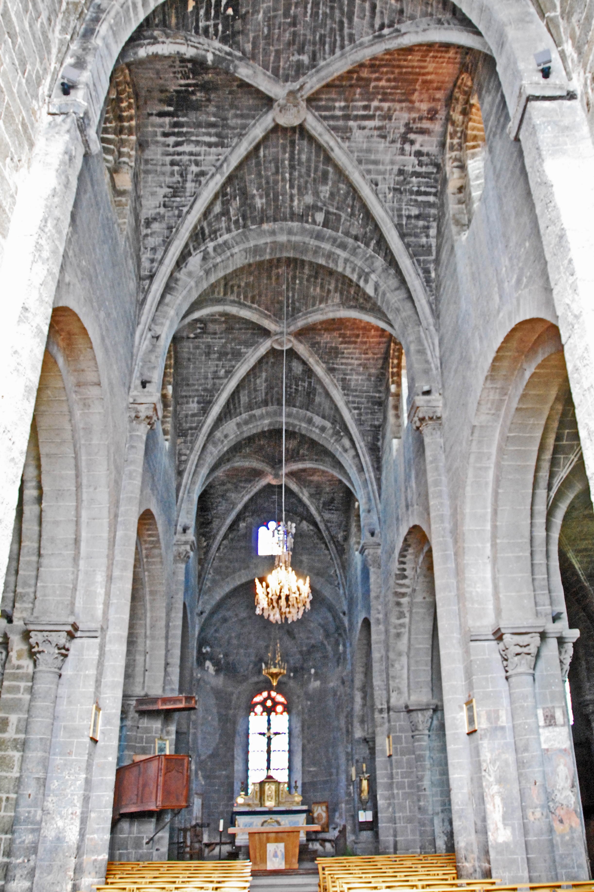 Canteuges,Kirche, Mittelschiff zum Chor